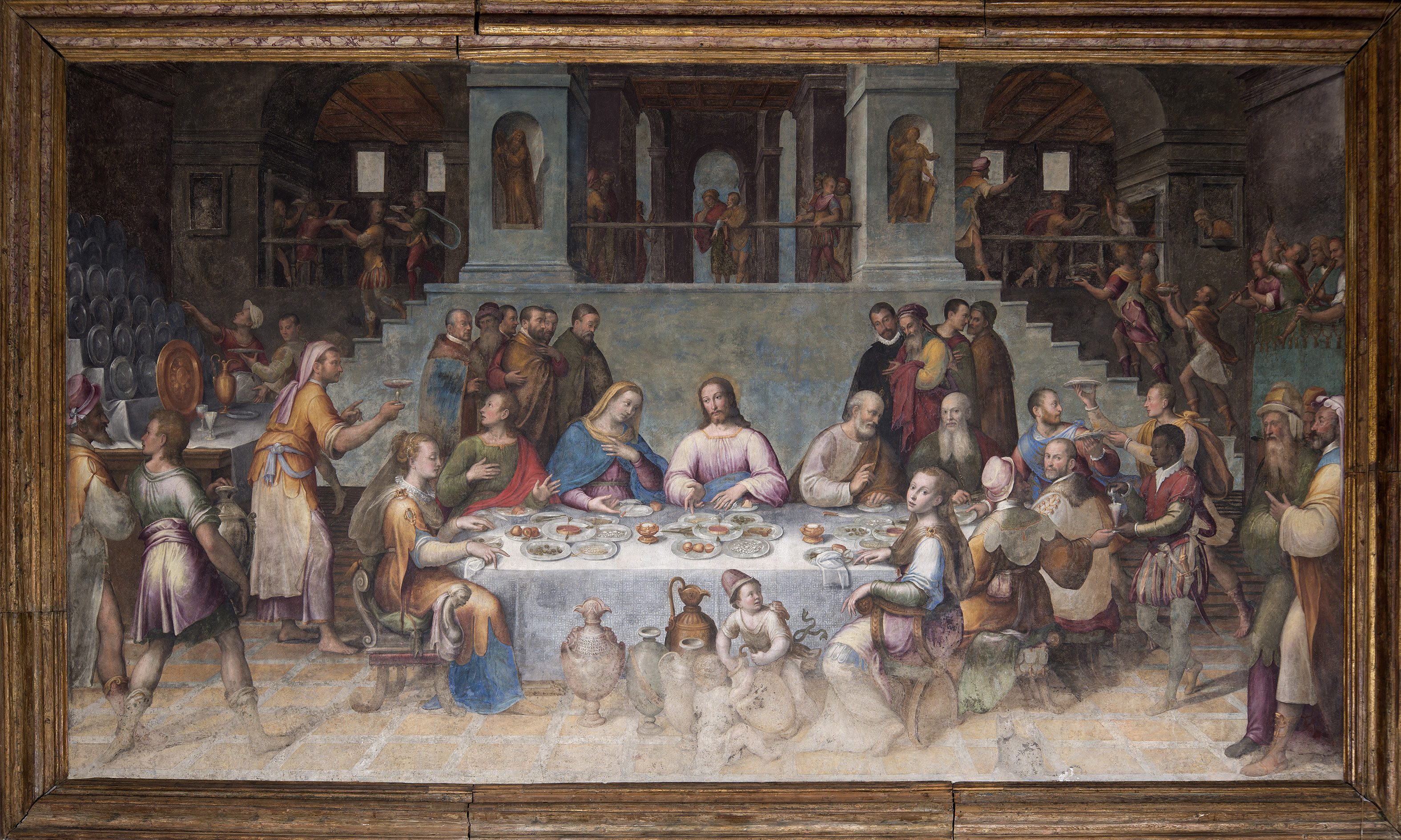 Le "Nozze di Cana" di Luca Longhi (1580), dipinto presso il refettorio dell'abbazia di Classe dentro - attualmente Biblioteca Classense - dopo il restauro del 2017.